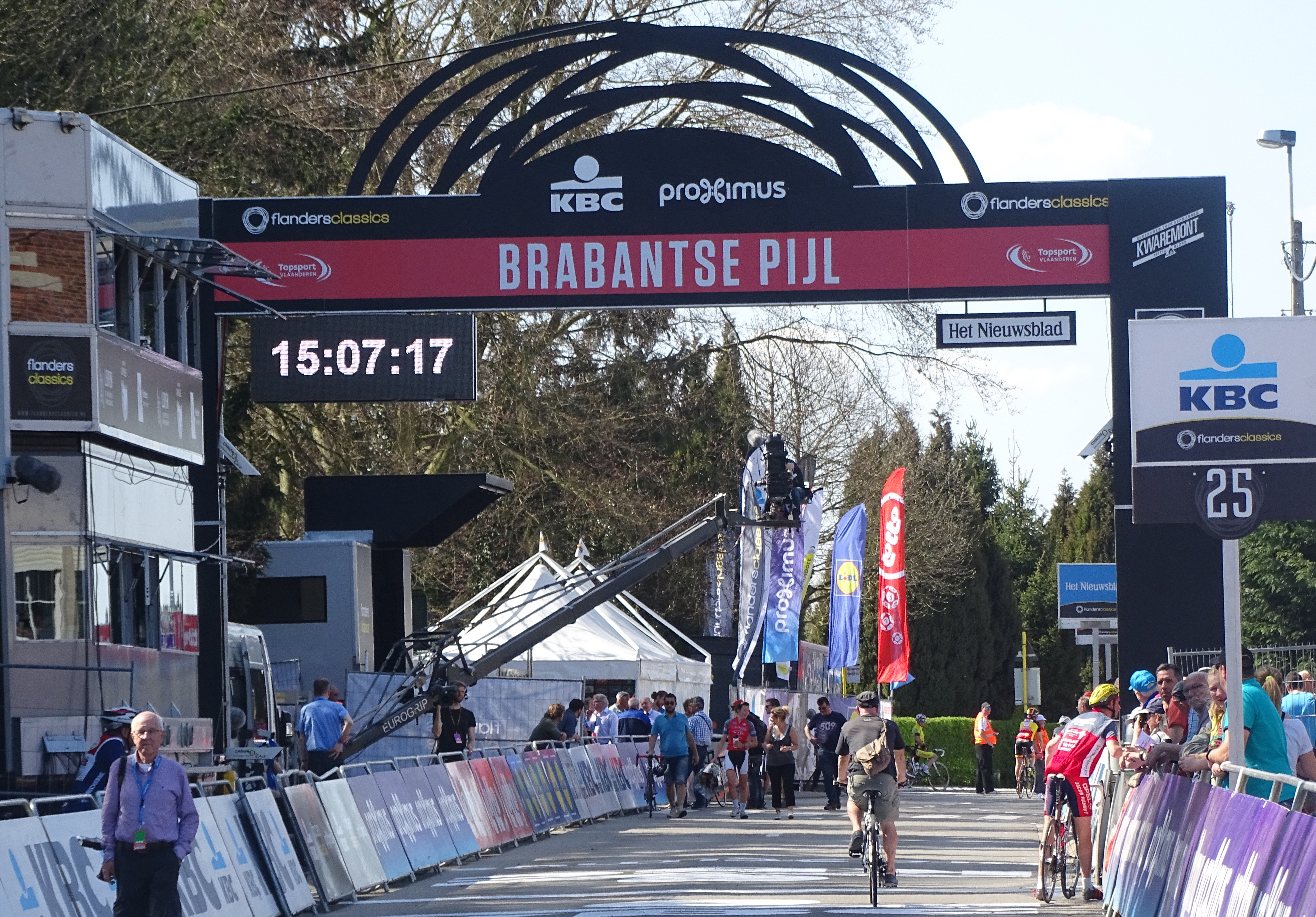 Reportage réalisé le mercredi 15 avril à l'occasion de l'arrivée de la Flèche brabançonne 2015 à Overijse, Belgique.